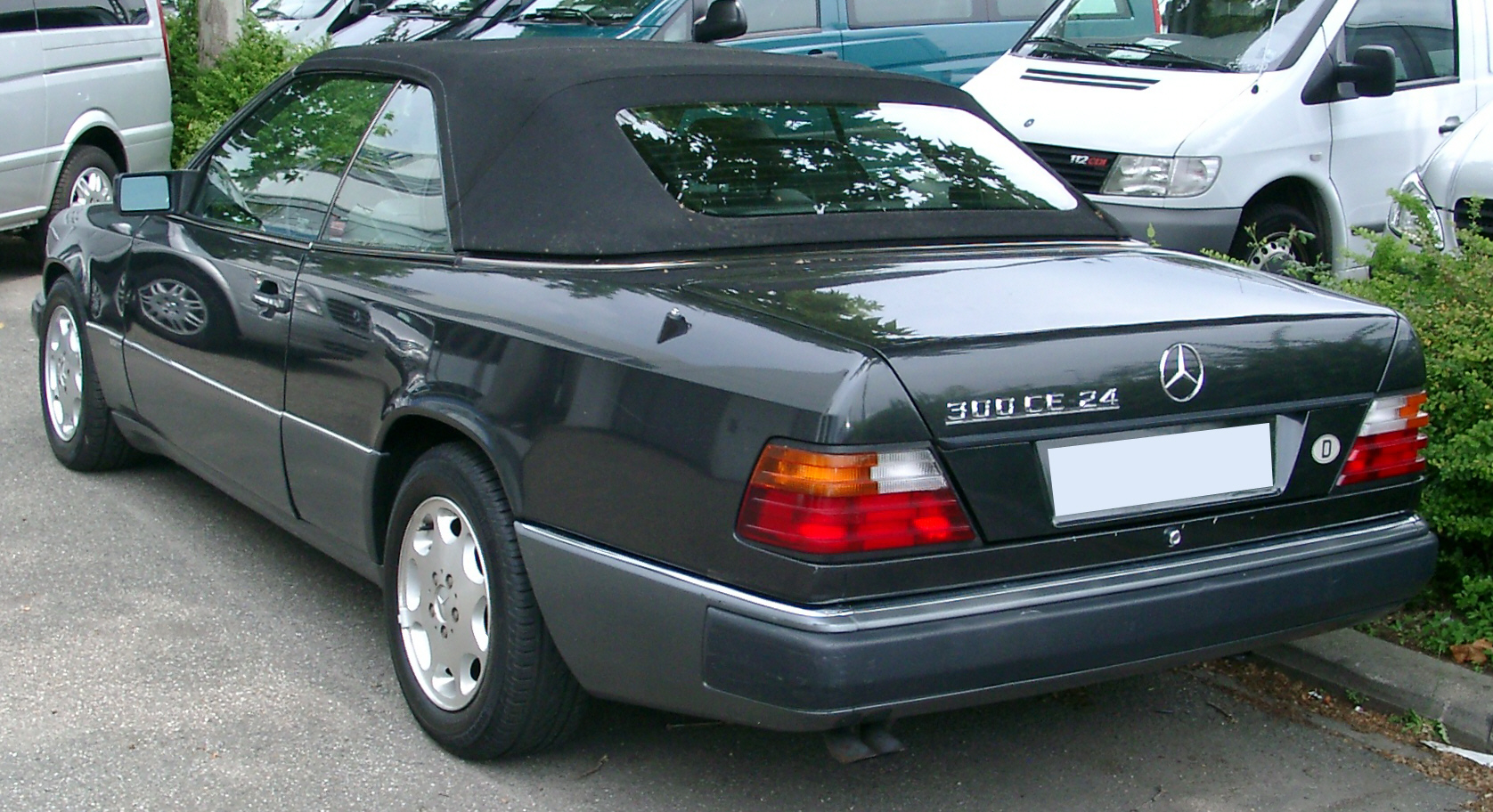 Mercedes W124 Cabriolet (A124)